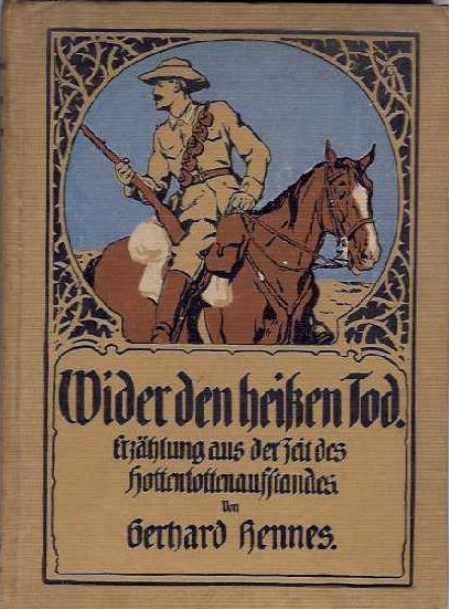 Gerhard Hennes: Wider den heißen Tod. Erzählung aus der Zeit des Hottentottenaufstandes, Verlag Bachem Cöln, 1915 (Aus allen Zeiten und Ländern. Band 23 )